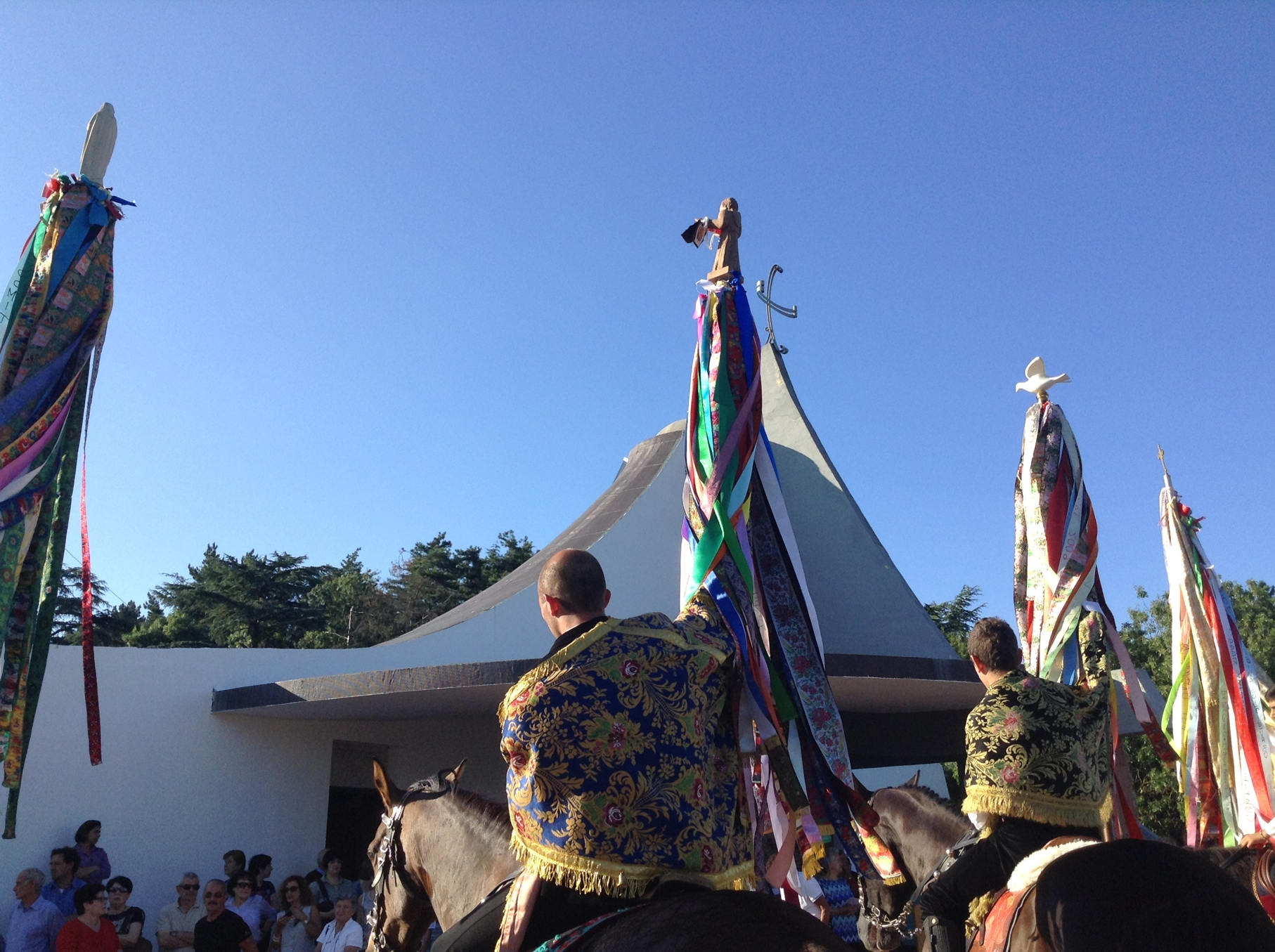 Banderas portate in processione durante la festa della Beata Vergine del Carmelo il 16 luglio 2014 a Pattada.